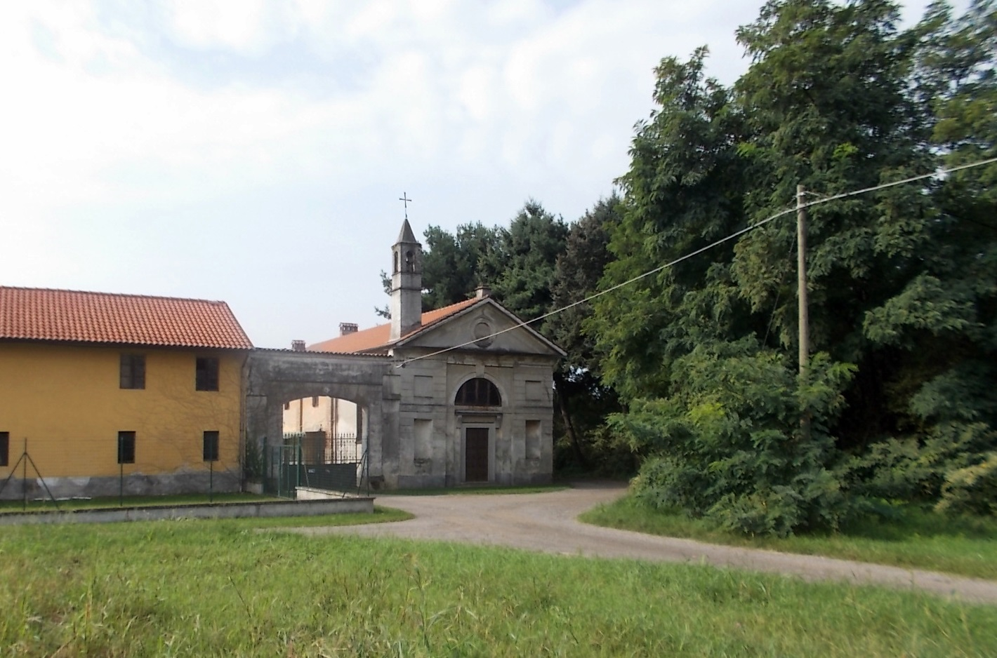 la cascina Gomarasca sulla strada provinciale 34 ad Arluno